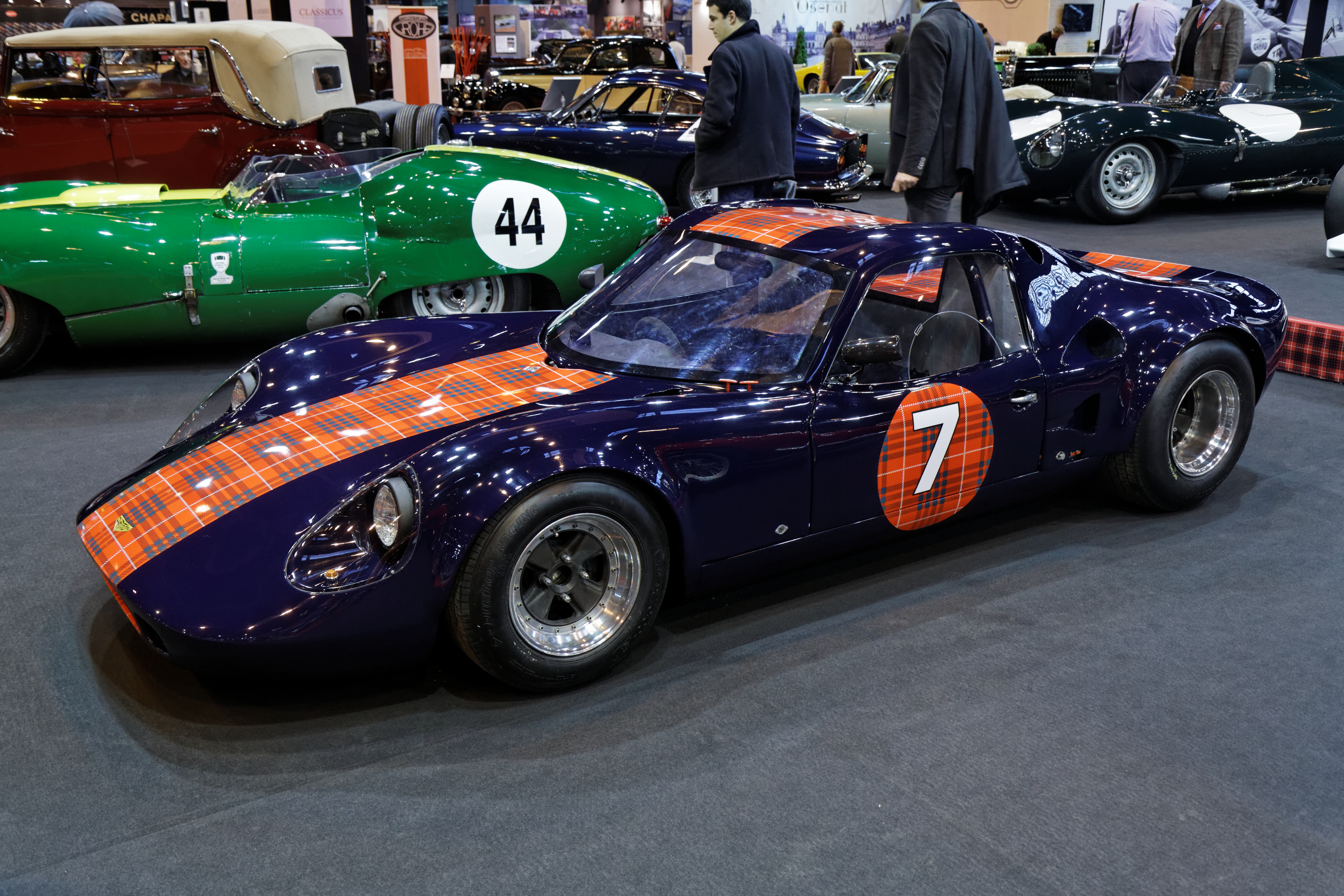 Une Chevron B8 exposée lors du salon Retromobile 2014.